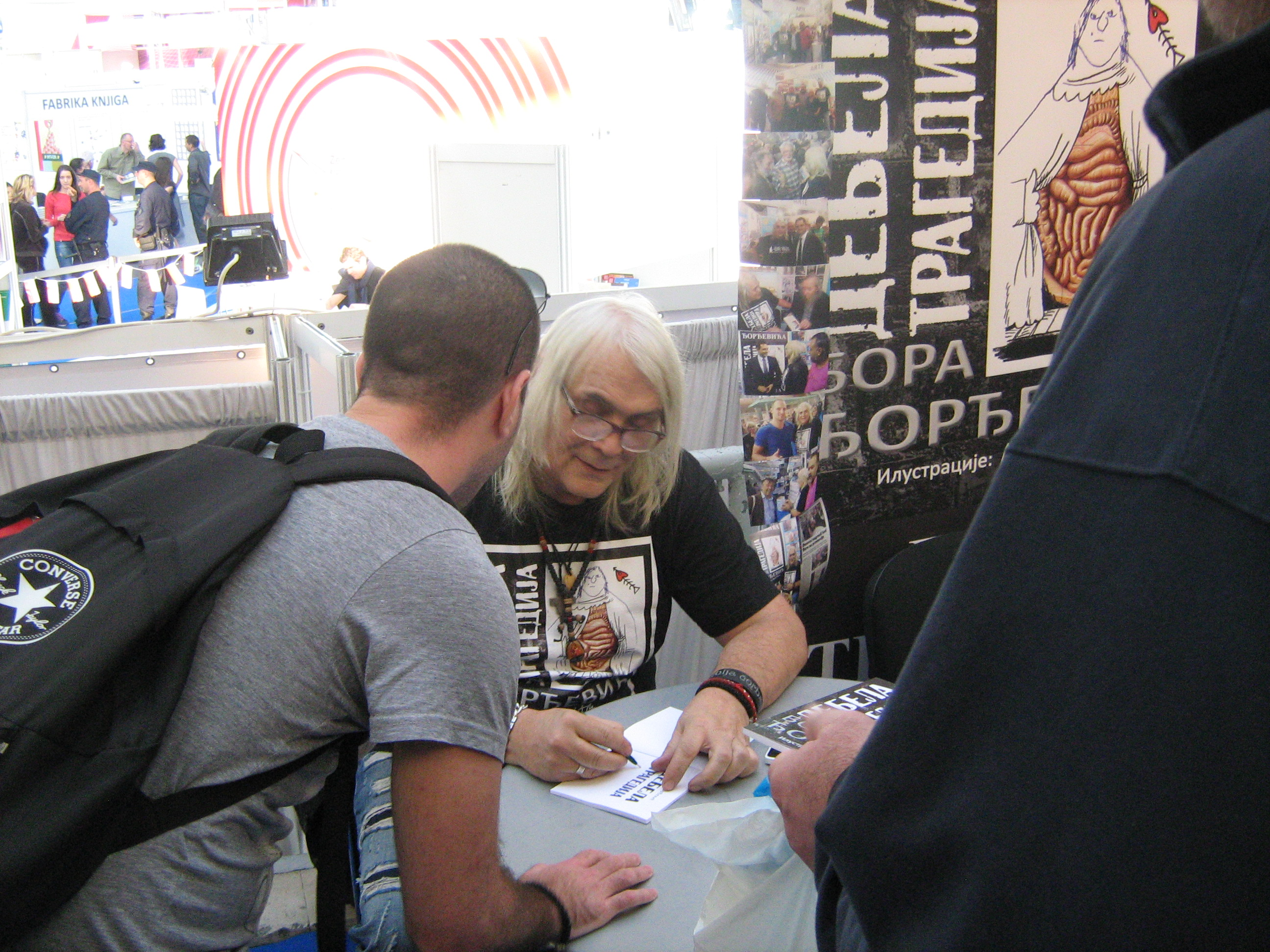 Бора Ђорђевић, на Сајму књига 2013. године